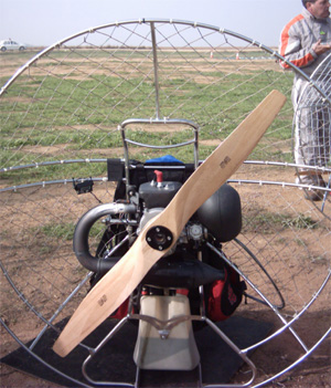 Paramotor